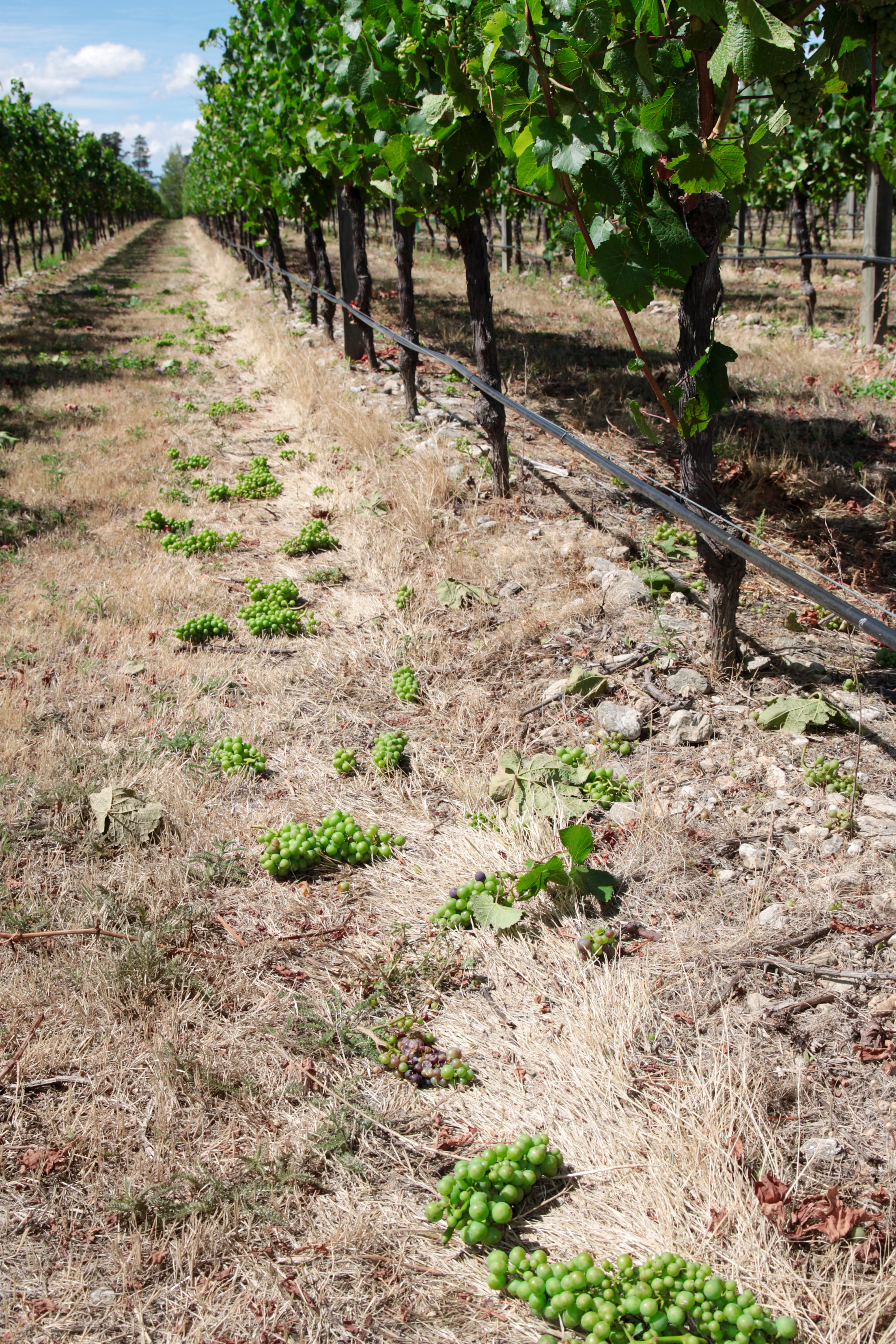 Vendange en vert avec grappes au sol